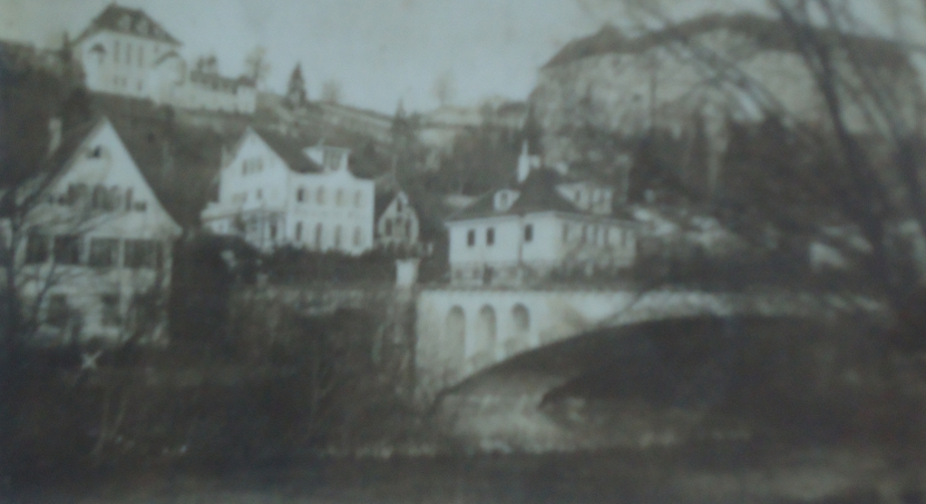 1. Arminenhaus in Tübingen, vorn links